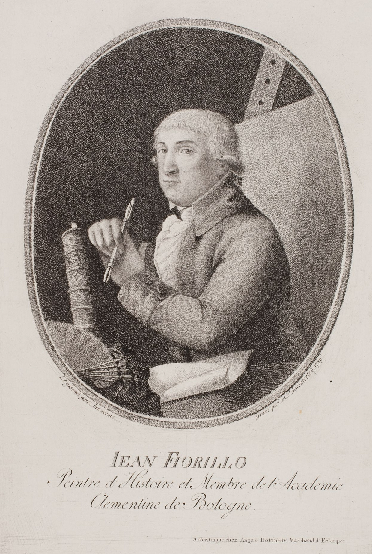 Bildnis Giovanni Domenico Fiorillo (Johann Dominik Fiorillo); Punktierstich; Wolfenbüttel, Herzog August Bibliothek, Inventar-Nr. A 6563 Angelo Bottinelli, Verleger; Giovanni Domenico Fiorillo, Zeichner; Heinrich Schwenterley, Stecher